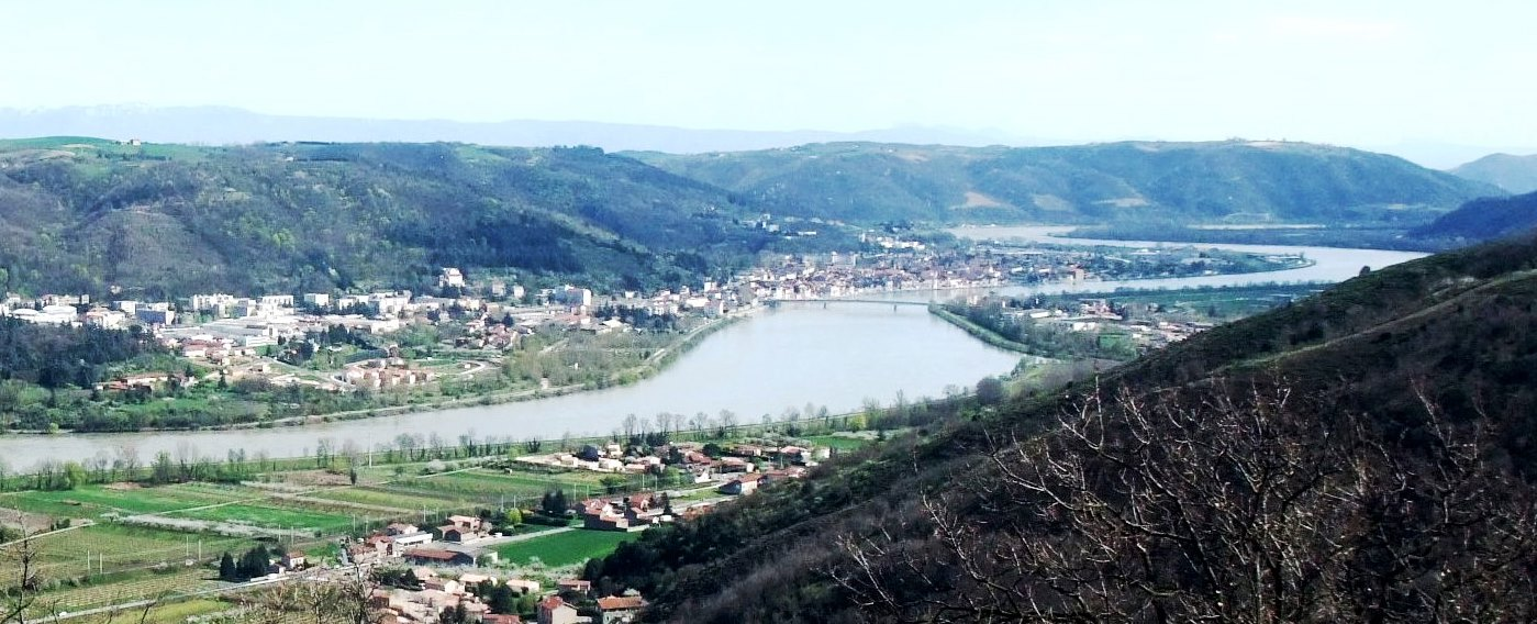 Talencieux les Monts